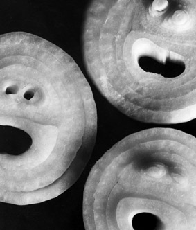 Aufnahme 3er aufgeschnittener Zwiebeln